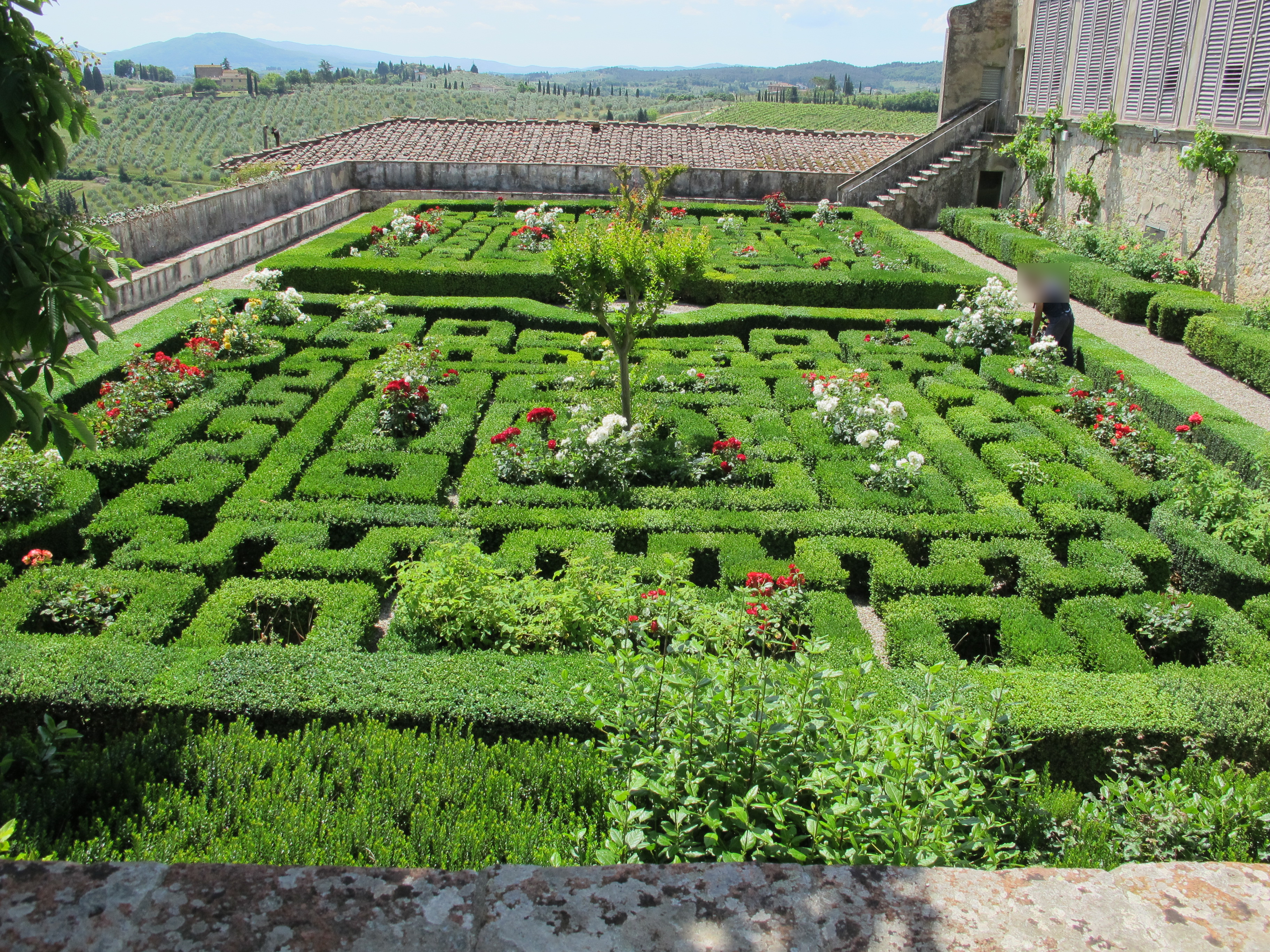 Villa Corsini (Mezzomonte)